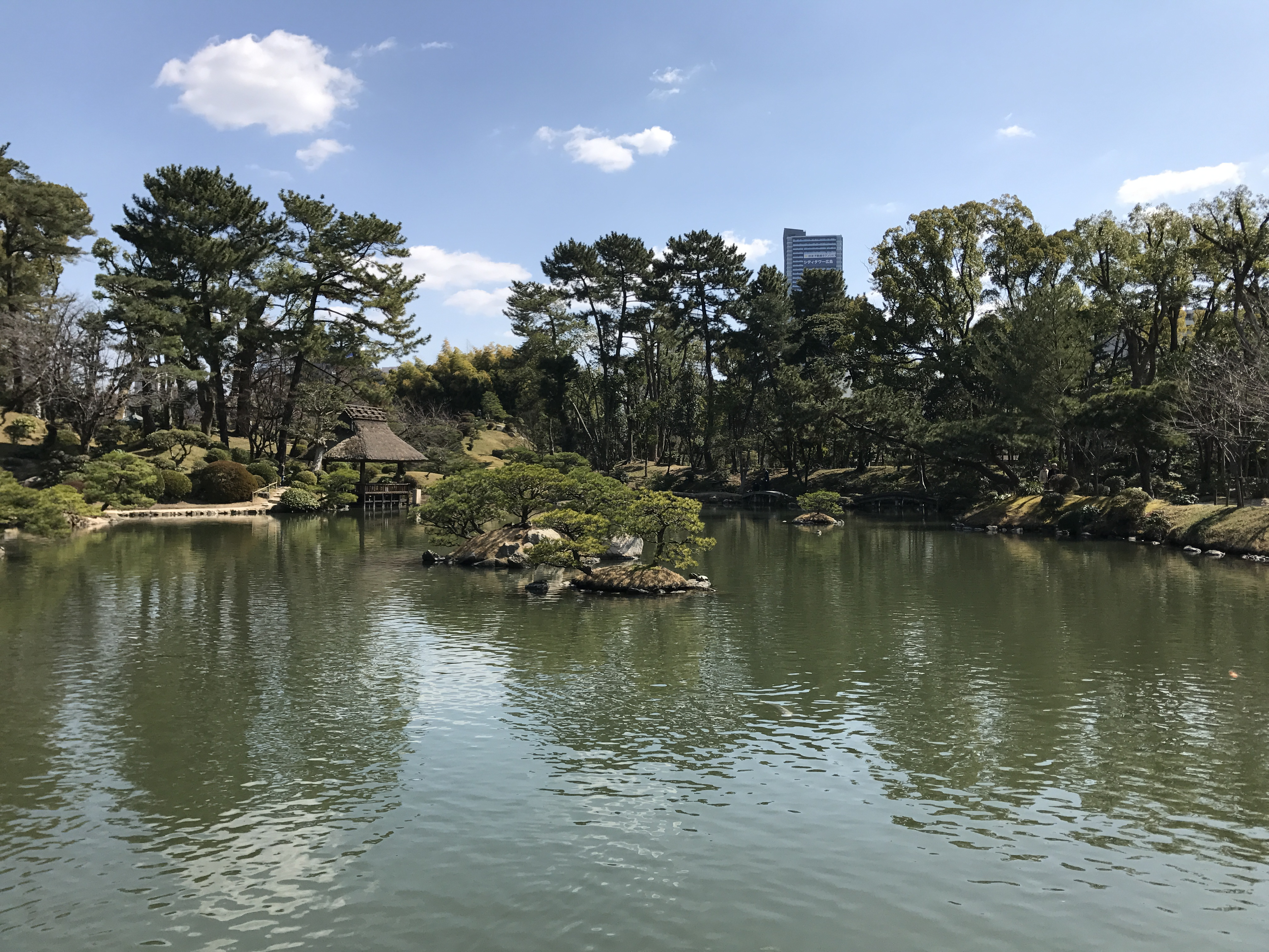 縮景園の跨虹橋より望む濯纓池と悠々亭